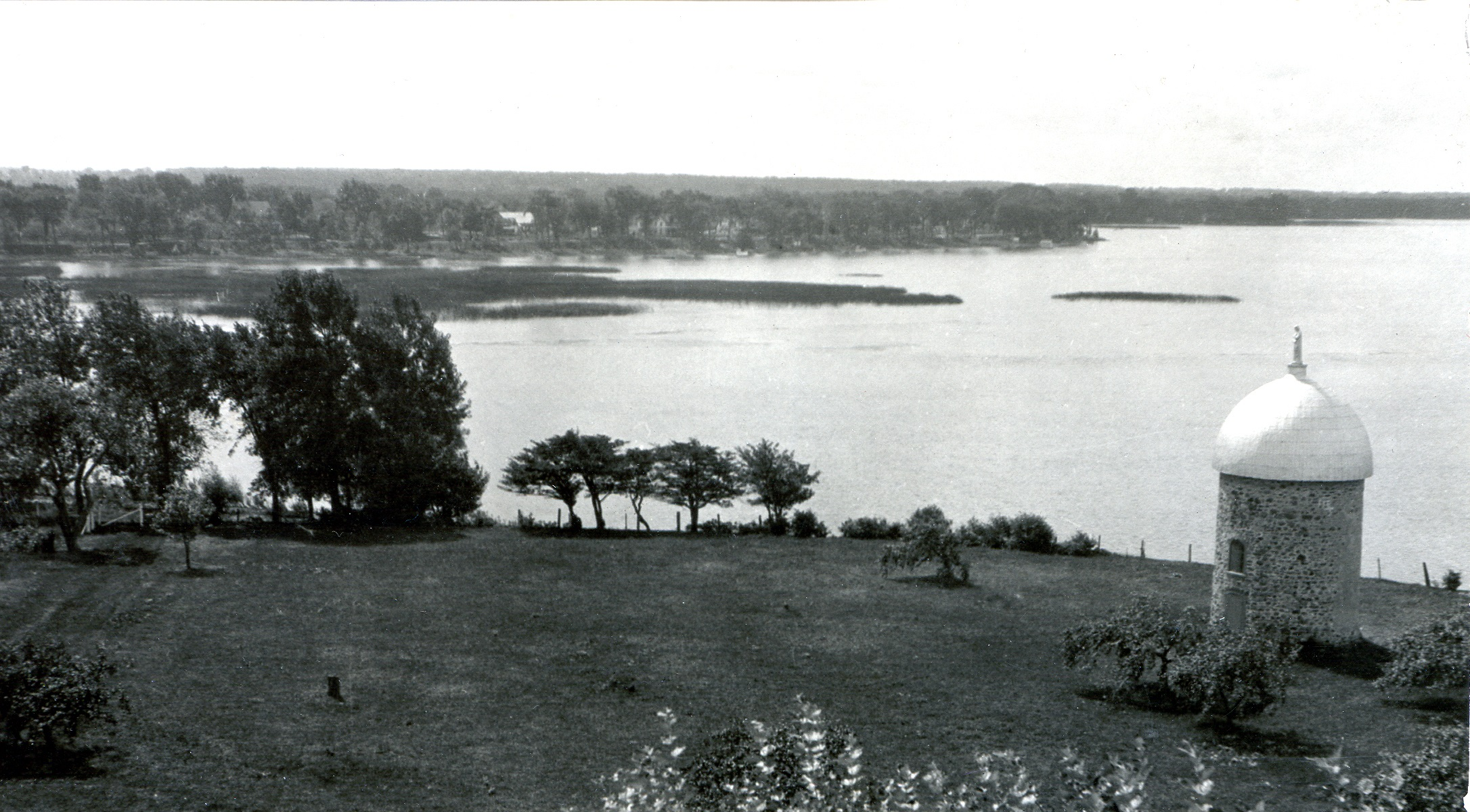 Partie nord de l'île Saint-Bernard, Châteauguay, vers 1940